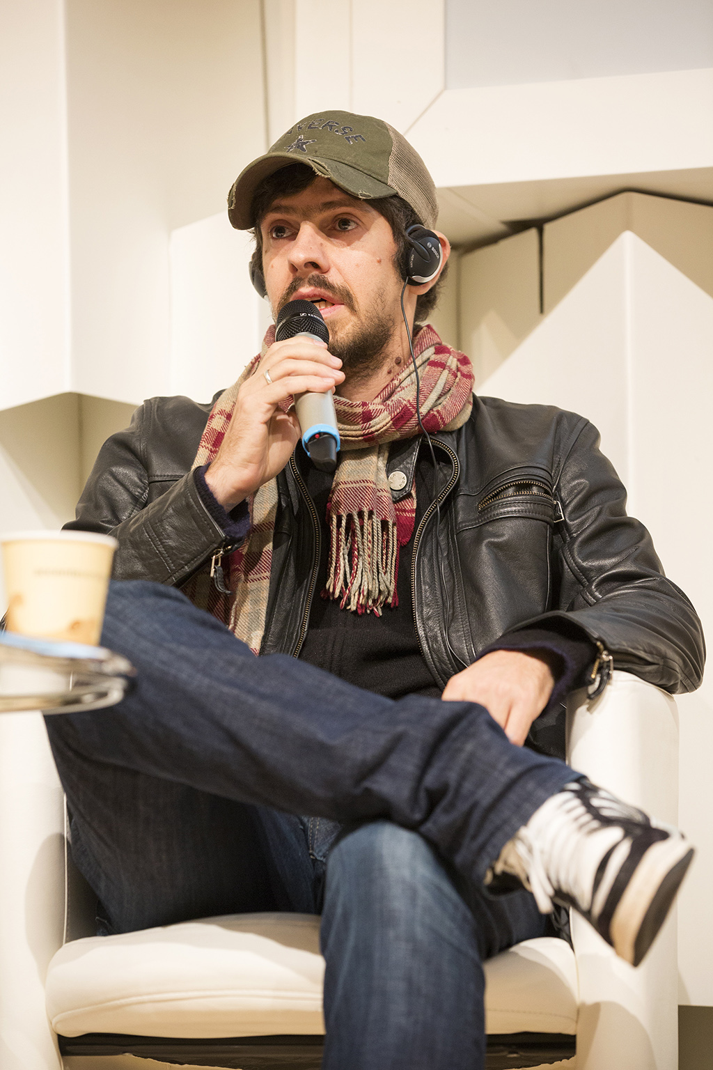 Alemanha | A participação do Brasil na Feira de Frankfurt se deu por meio dos ministérios da Cultura e Relações Exteriores, FBN, Fundação Nacional de Artes (Funarte), Câmara Brasileira do Livro, com apoio da Embratur, Agência Brasileira de Promoção de Exportações e Investimentos (Apex-Brasil) e Sesc São Paulo. bit.ly/1clVotx Foto: Gijs Versteeg